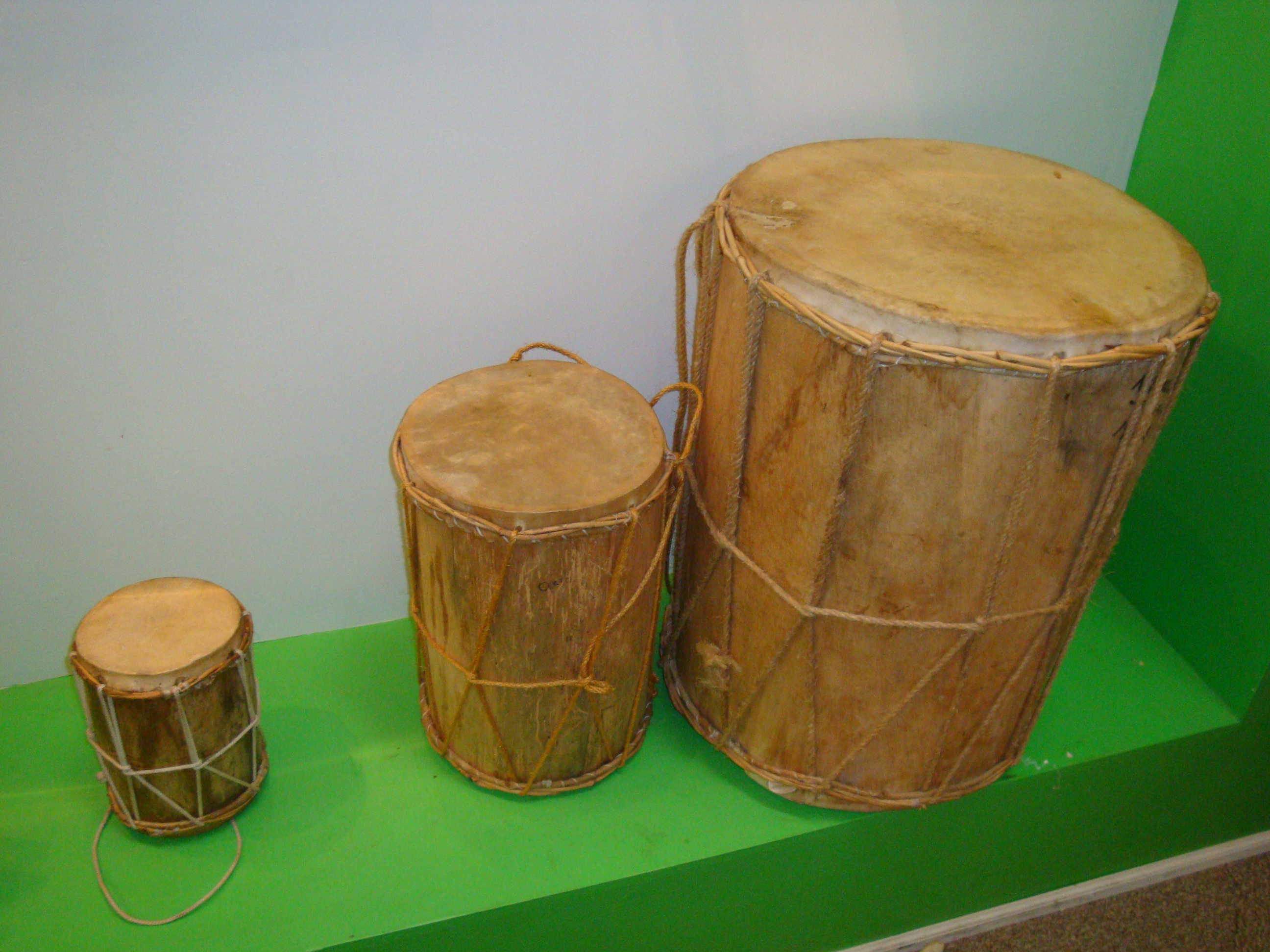 Los tres tamaños de tambores (el chico llamado "chojoben", el mediano y el grande llamado "maeshtoson), utilizados por los "Tamborileros de Tabasco" grupo musical autóctono del municipio de Nacajuca y símbolo del estado de Tabasco, México